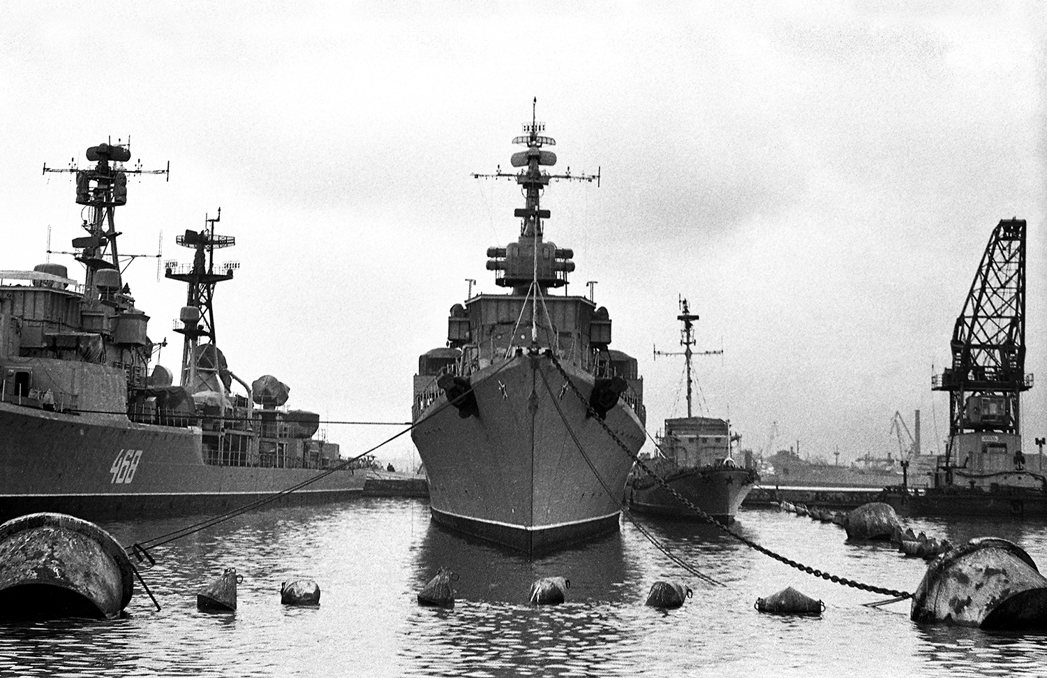 Sõjalaevad Paljassaare sadamas 1972